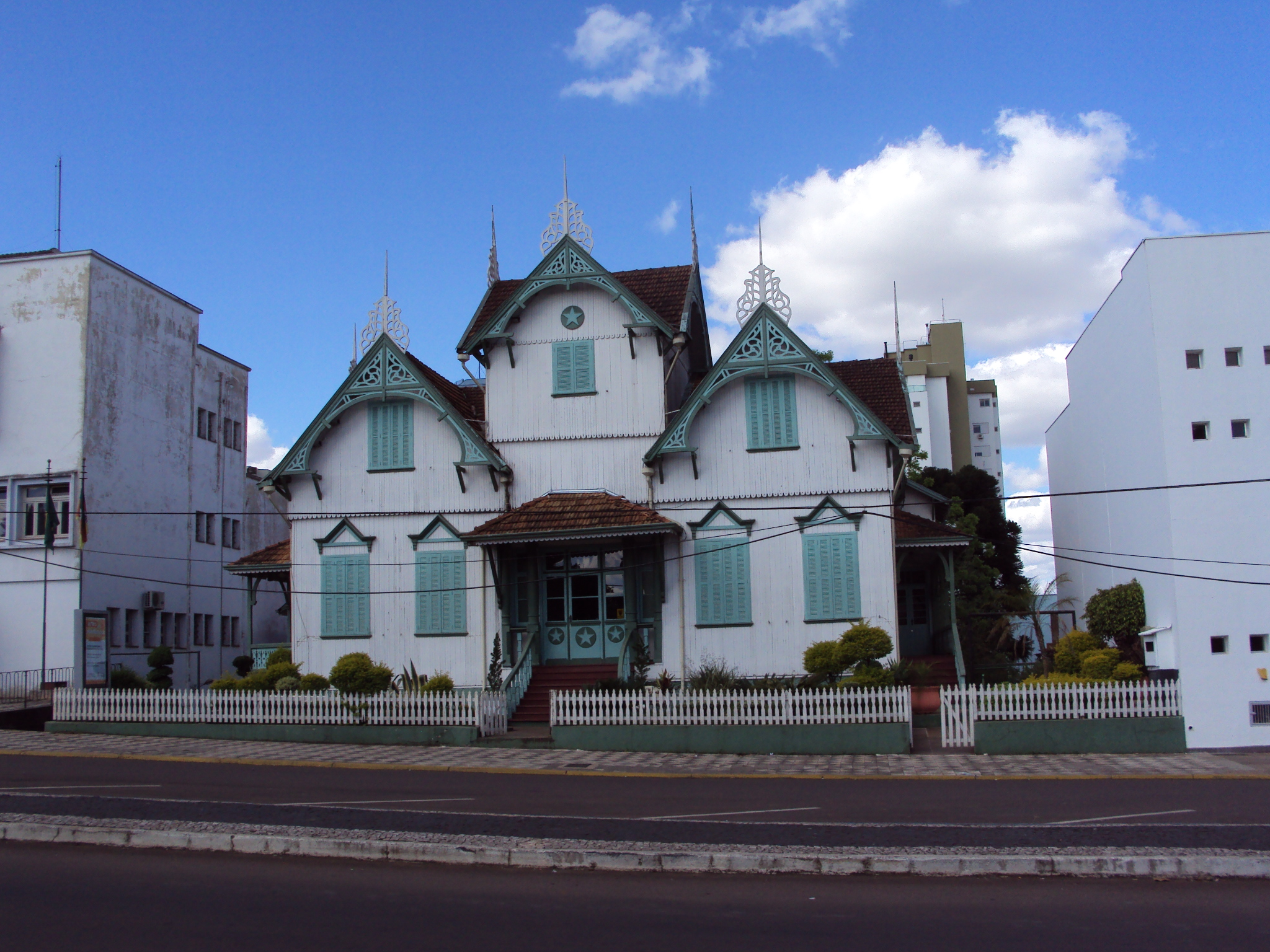 Castelinho, no Erechim, no Brasil.